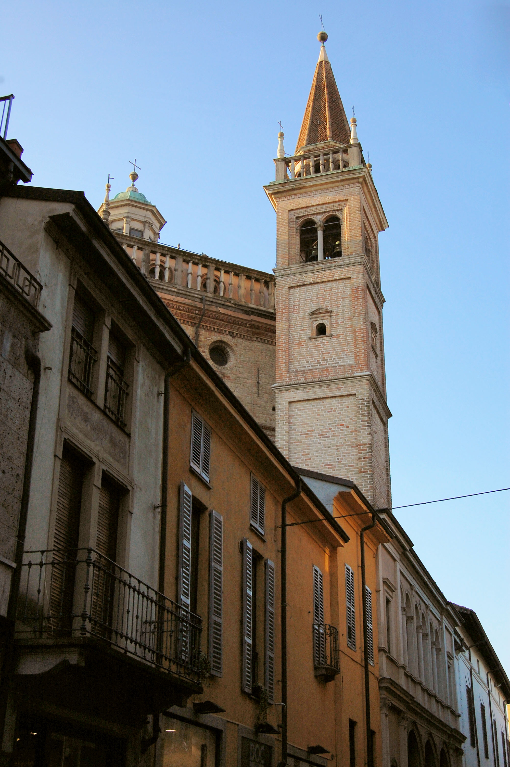 Scorcio del Tempio dell'Incoronata a Lodi